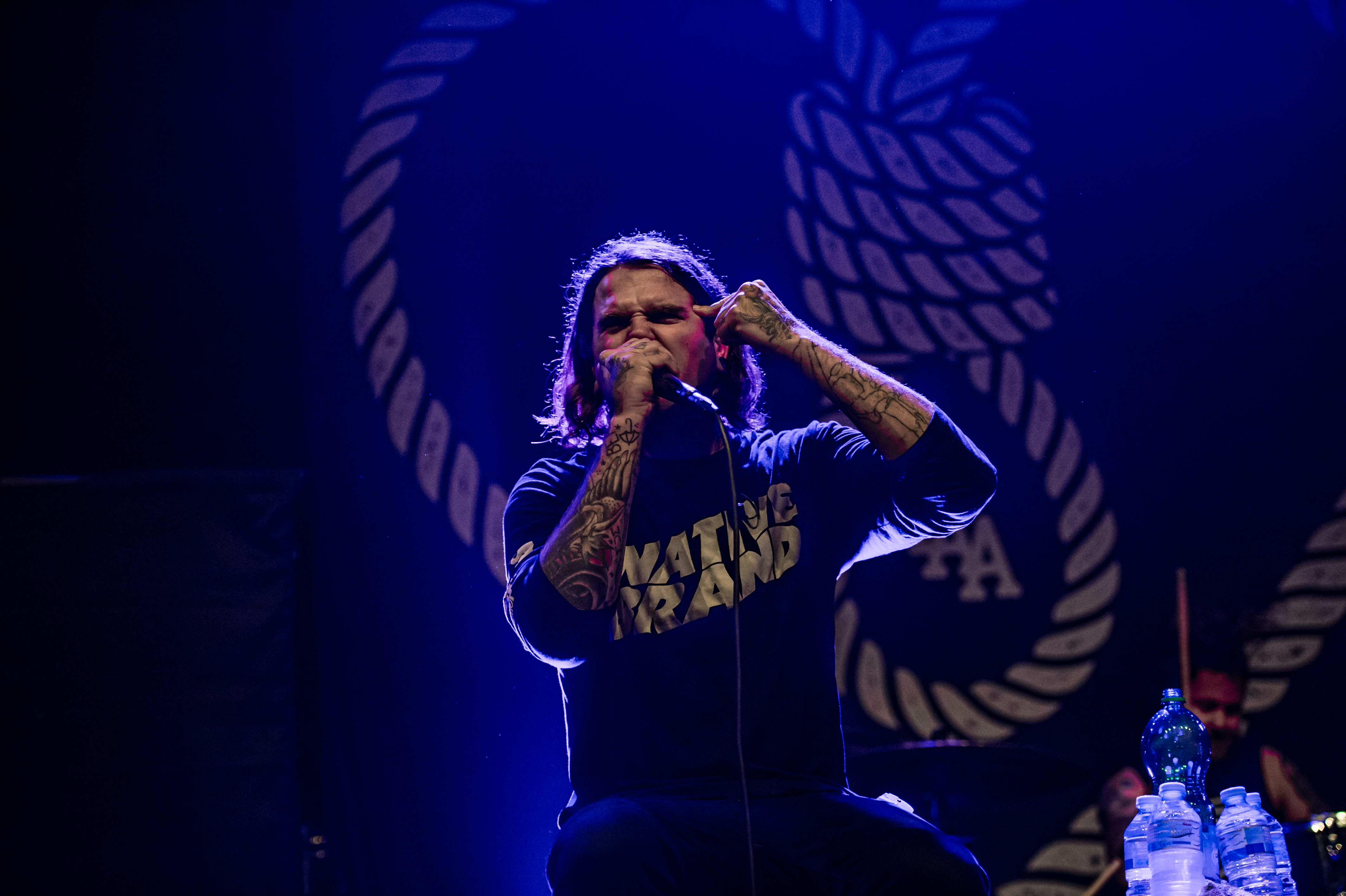 'The Amity Affliction - Impericon Never Say DIE! - Oberhausen'